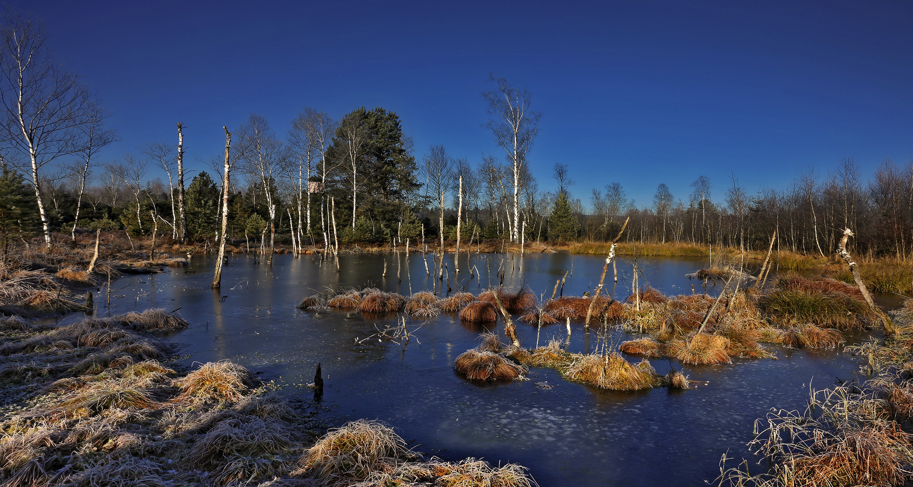 Wenger Moor am Wallersee / Salzburg This media shows the nature reserve in Salzburg with the ID NSG00014.